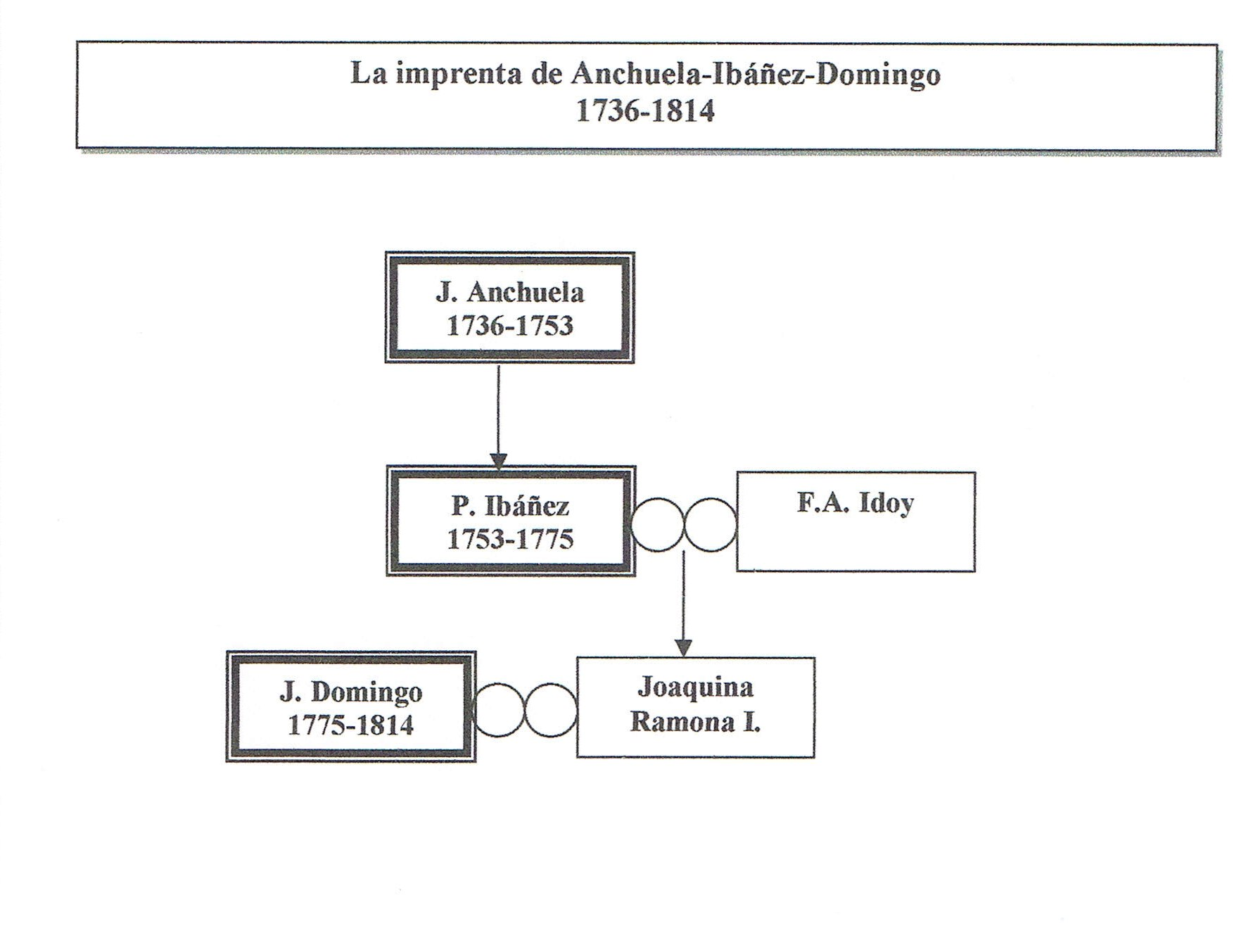 La imprenta de Jerónimo de Anchuela y su transmisión posterior en las de Pascual Ibáñez y Joaquín Domingo. Pamplona (1736-1814)